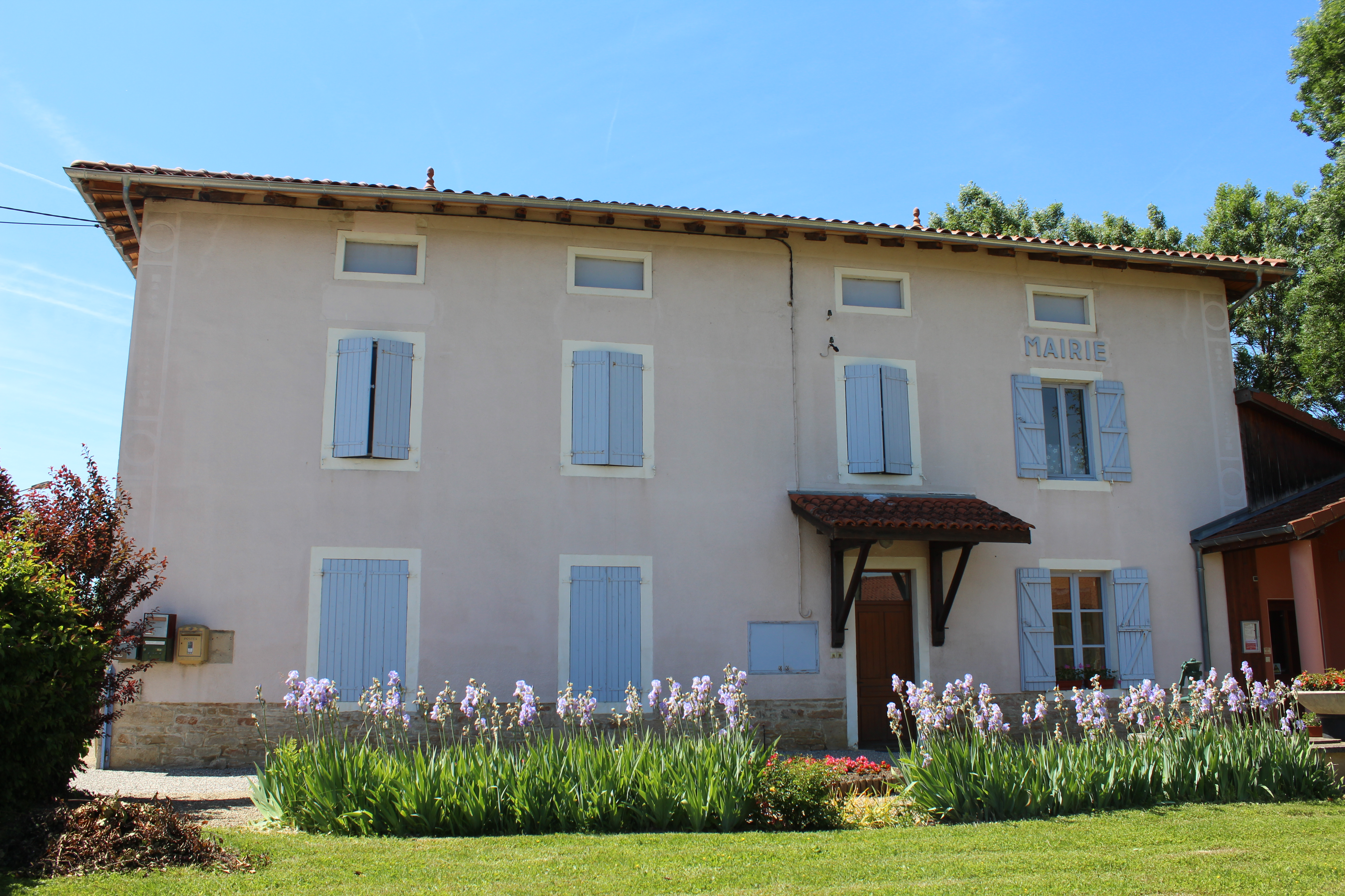 Mairie de Villemotier.